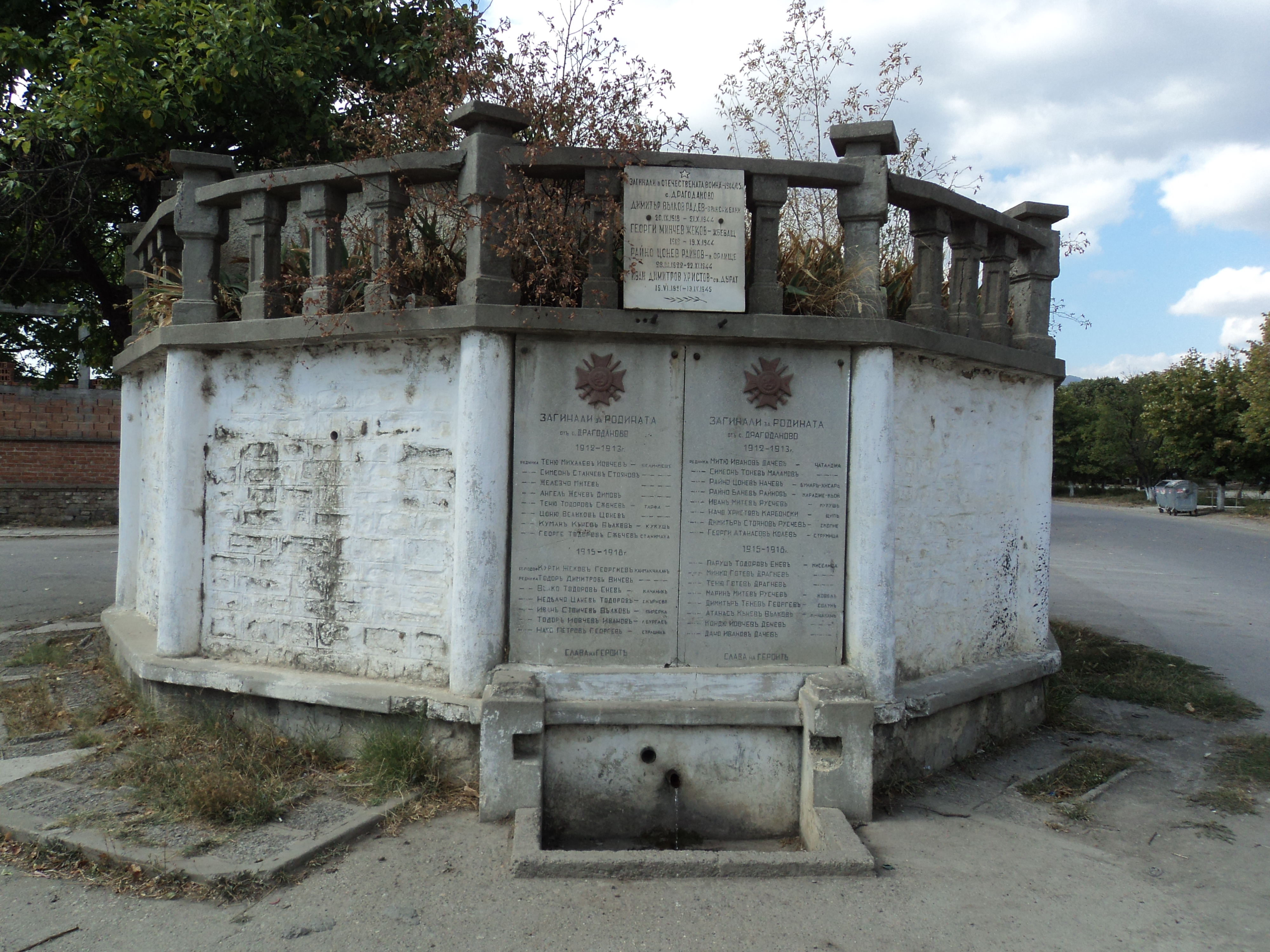 Сладкия извор в центъра на селото.